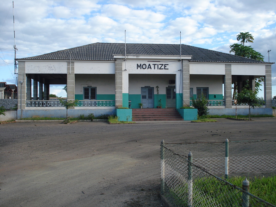 Foto da ainda desactivada Estação Ferroviária de Moatize, terminus da linha de Sena Moçambique